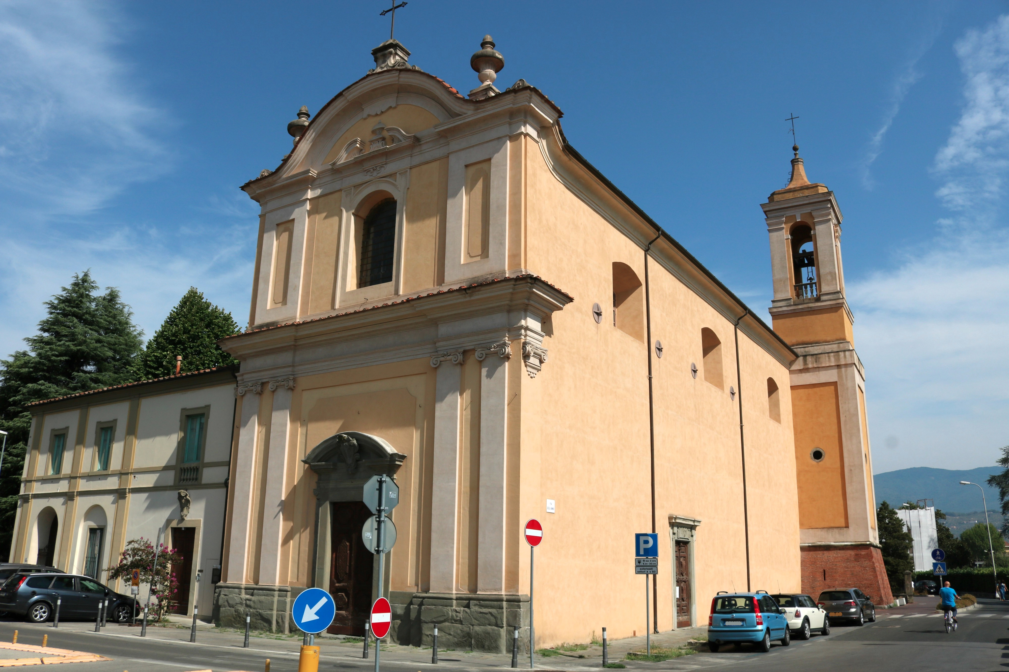 Chiesa di Santa Maria del Carmine (Pistoia)